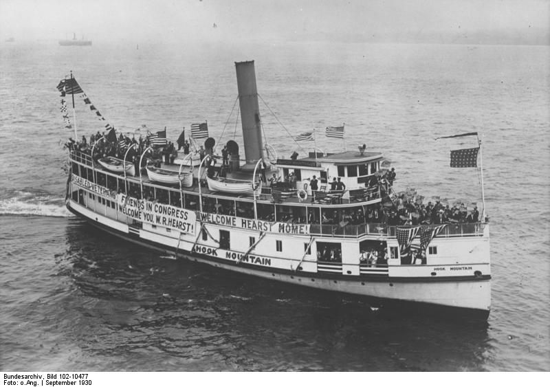 Wie Randolf Hearst, der amerikanische Zeitungskönig bei seiner Ankunft in Amerika empfangen wurde. Ein mit Willkommensgrüssen ausgeschmückter Damper vor der Einfahrt des New Yorker Hafens.